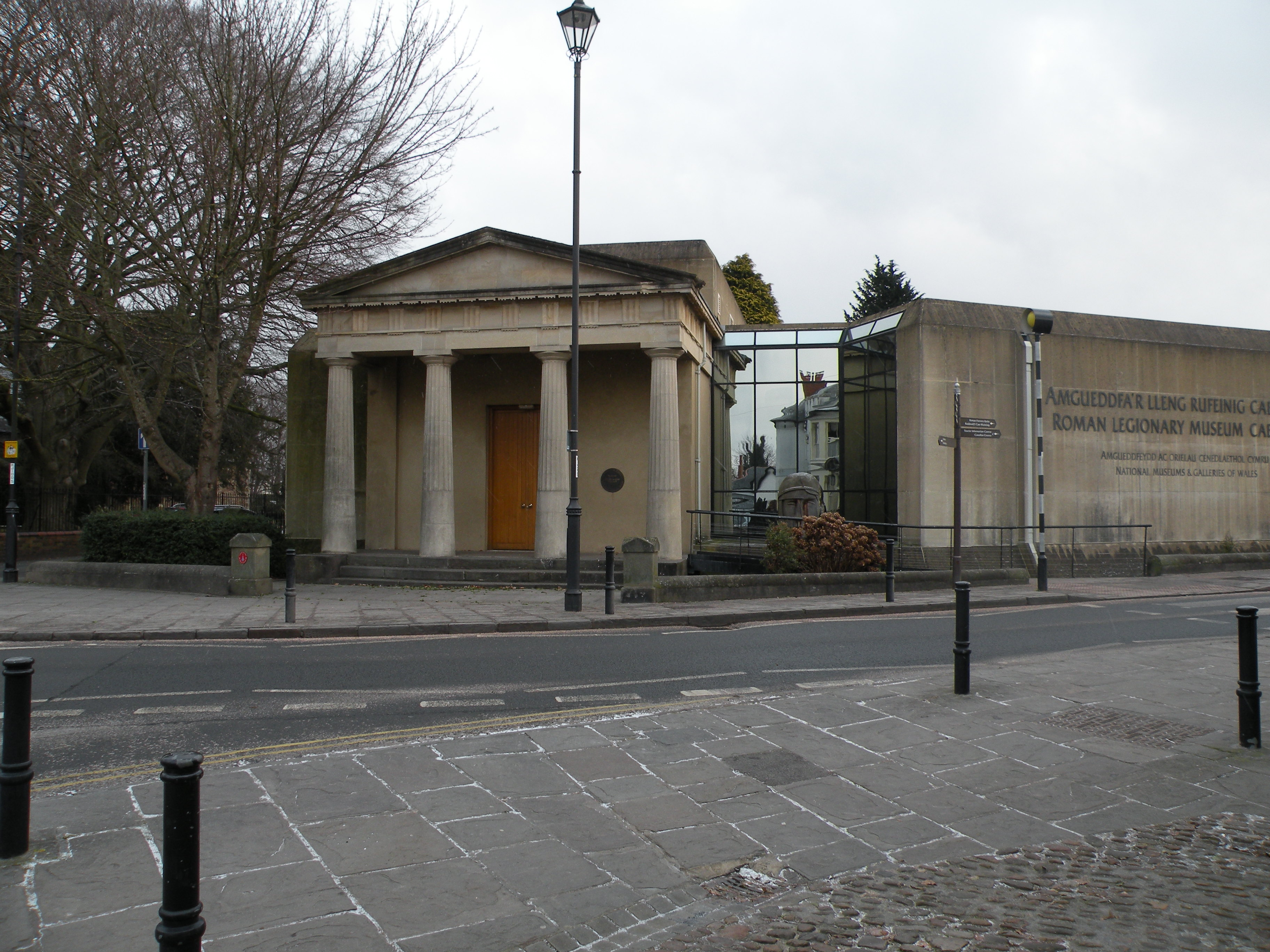 Musée Légionnaire Romain de caerleon, pays de galles